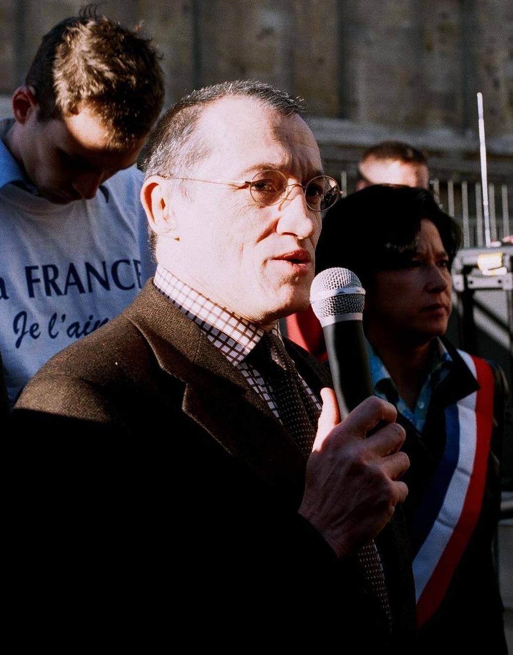 Paul-Marie Coûteaux à la manifestion du MPF devant l'Assemblée nationale